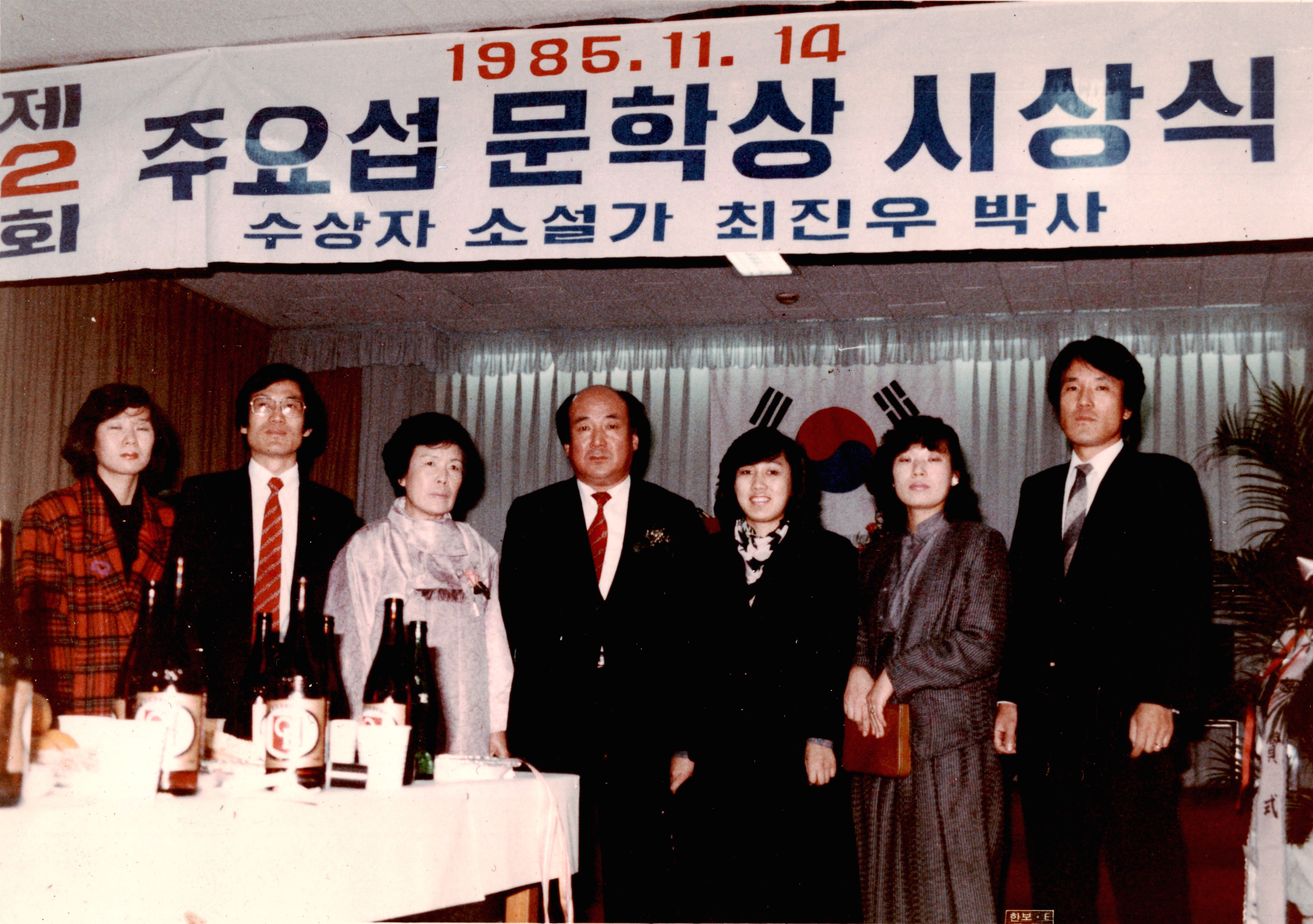 1985년 11월 14일 제2회 주요섭 문학상 시상식(수상자 소설가 최진우 박사)